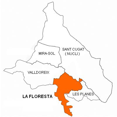 La Floresta (Sant Cugat del Vallès).